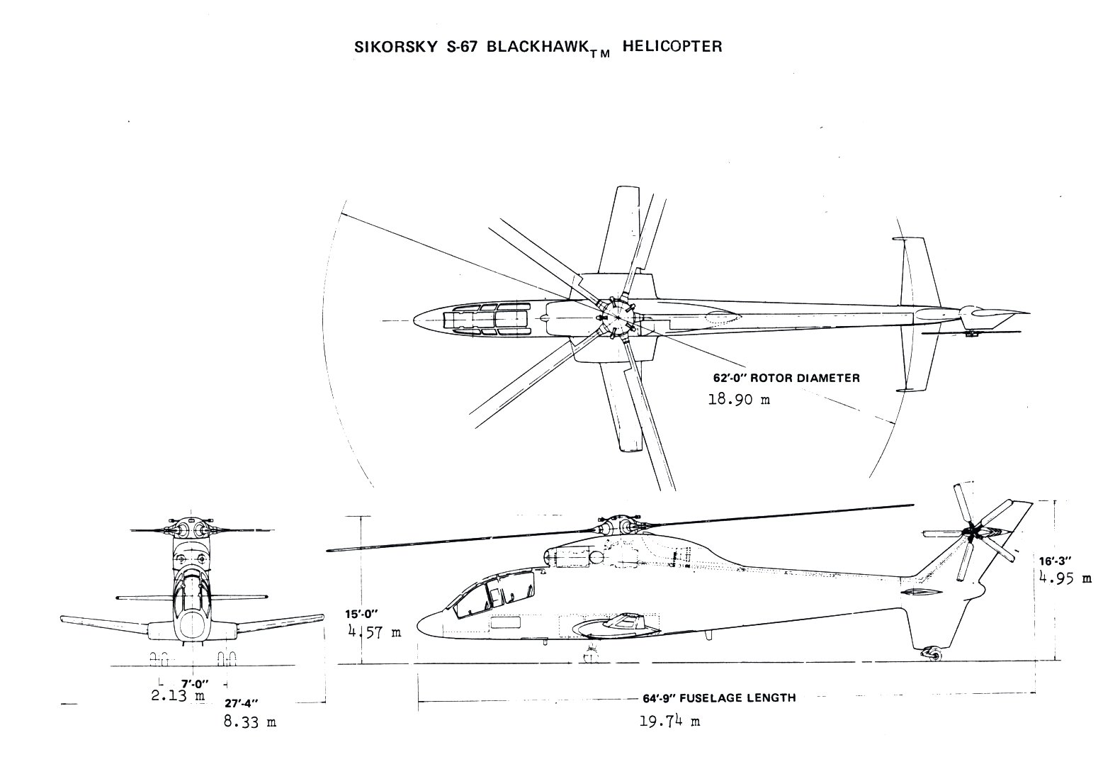 Plan 3 vues du Sikorsky S-67.